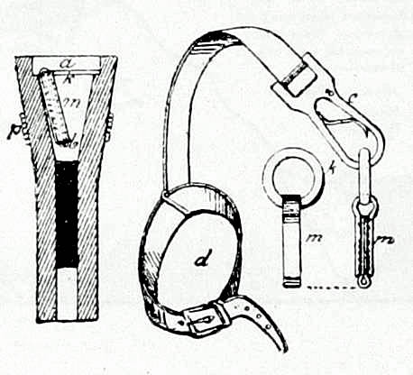 Это изо было использовано в статье «Гранатная (дистанционная) трубка» опубликованной в восьмом томе «Военной энциклопедии», который был издан книгоиздательским товариществом И. Д. Сытина в 1912 году в столице Российской империи городе Санкт-Петербурге.